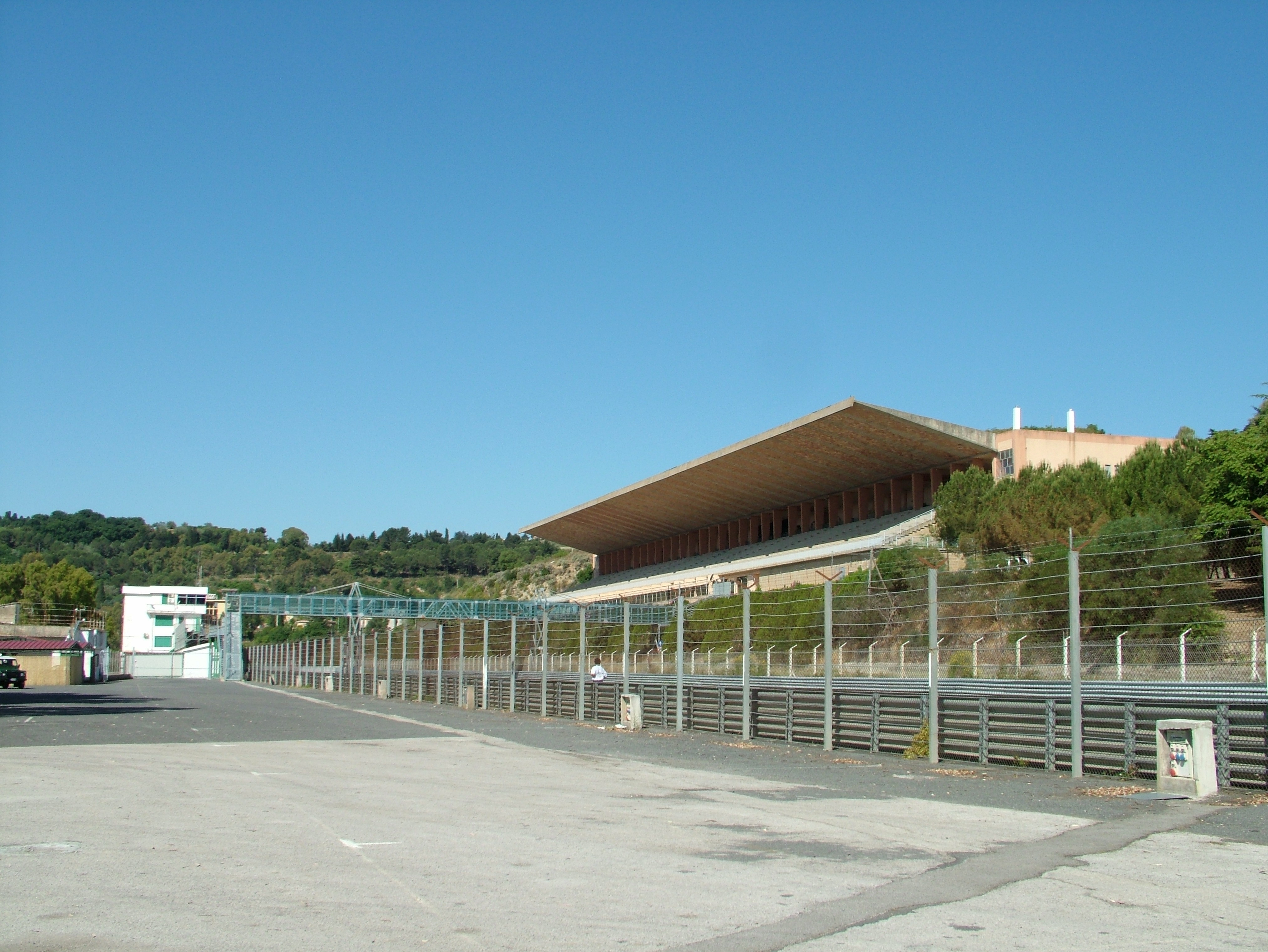 Enna, Sizilien, die Tribüne des Autodrom die Pergusa